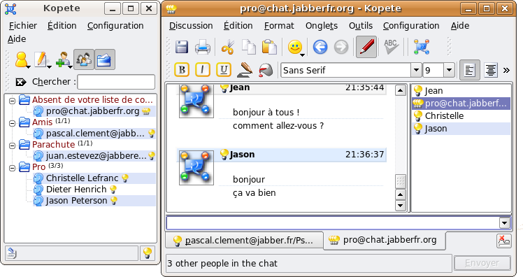 Copie d'écran de Kopete